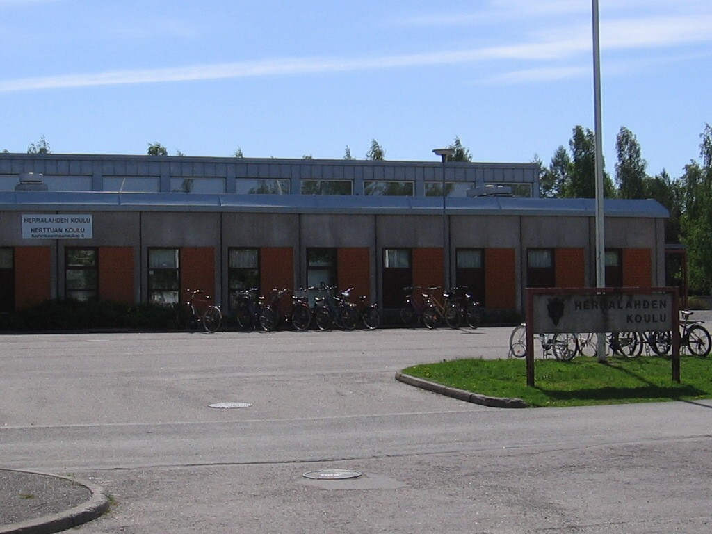 Herralahden koulu Porissa